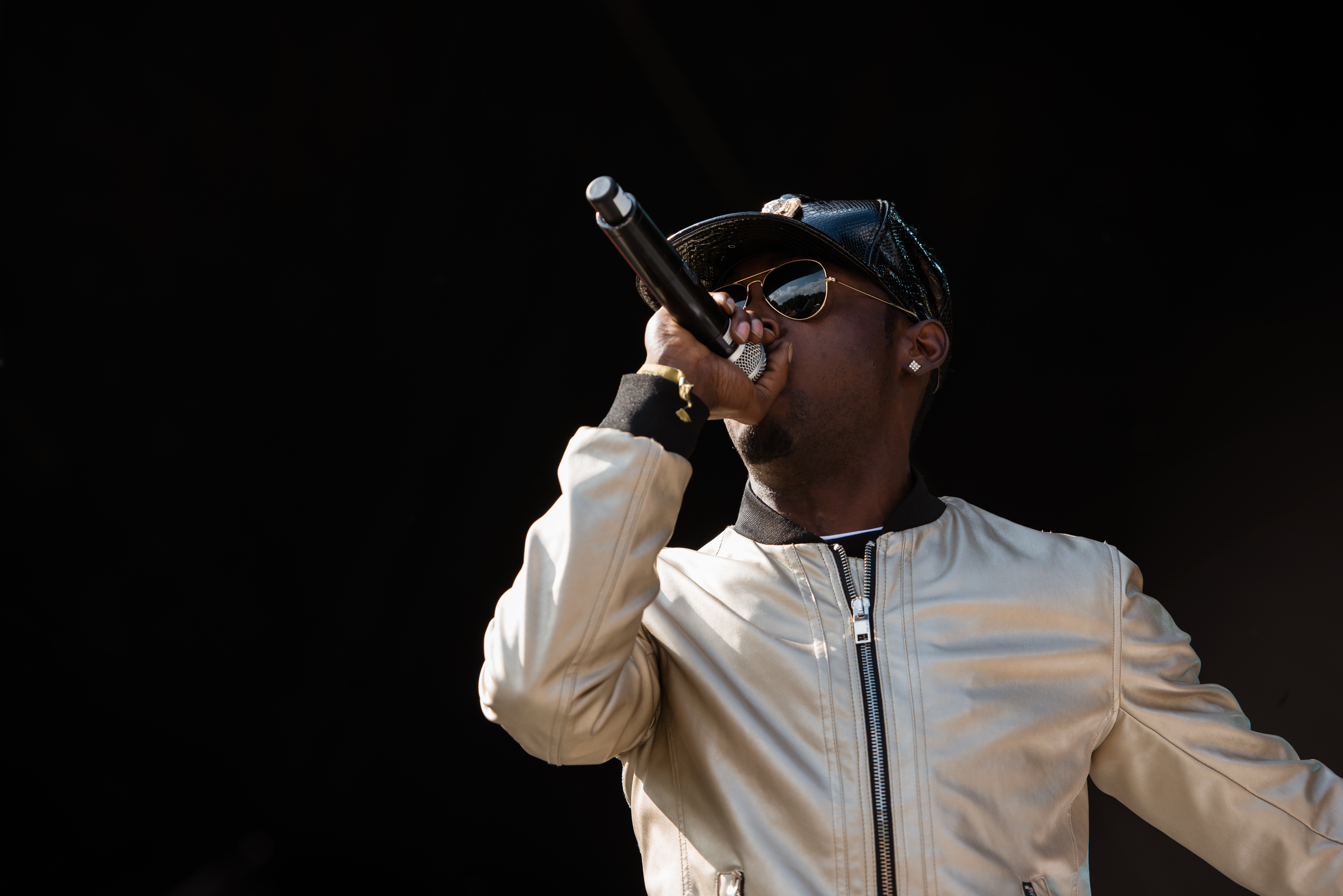 'Ruhr Reggae Summer 2014 - Dortmund': 'Stylo G'